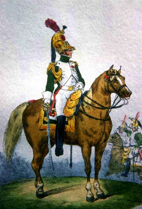 Officier des dragons de la Garde impériale en grande tenue.